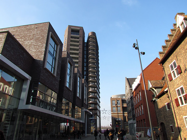 Wijngaardstraat in westelijke richting